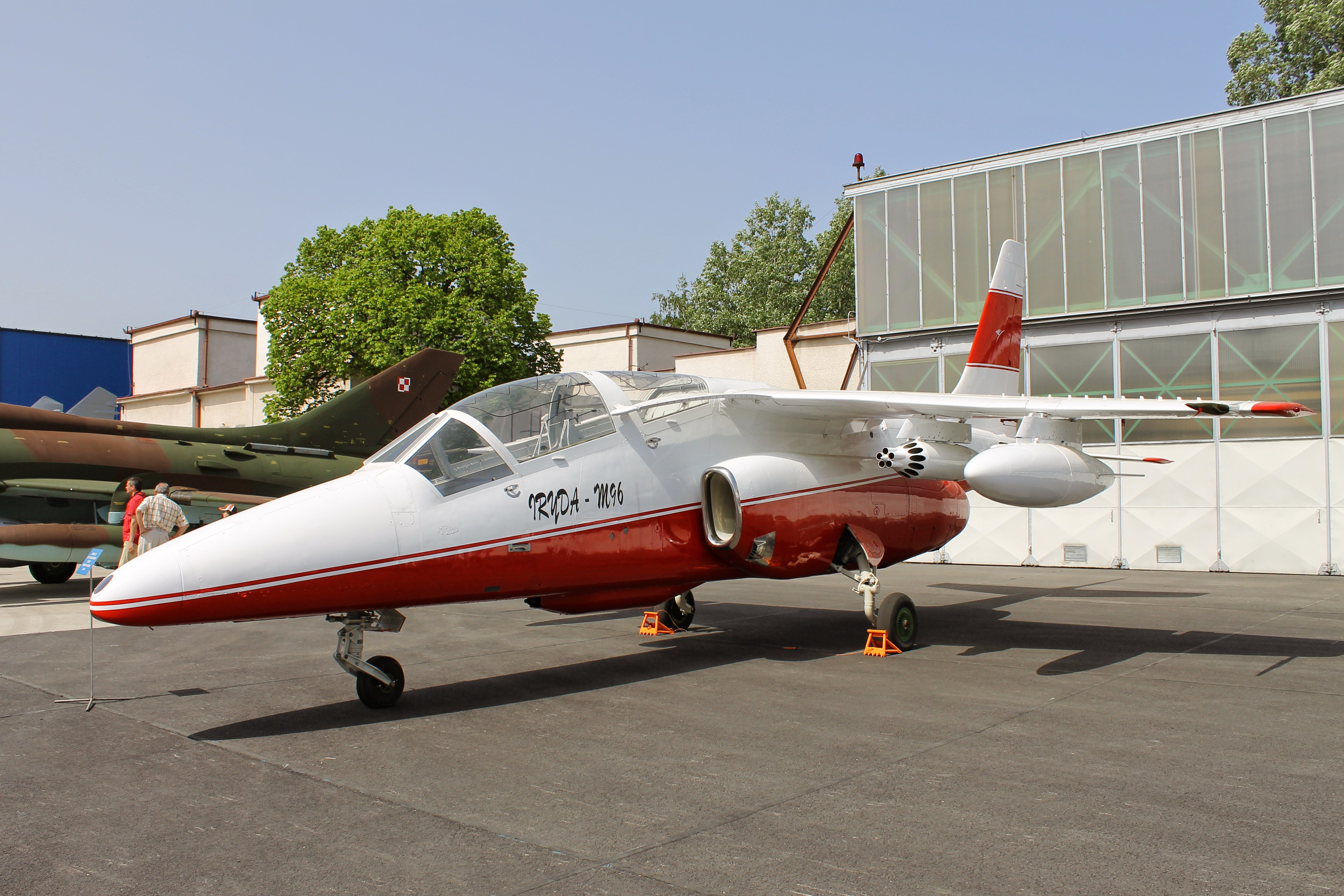 Iryda M96 podzczas Air Fair Bydgoszcz 2013